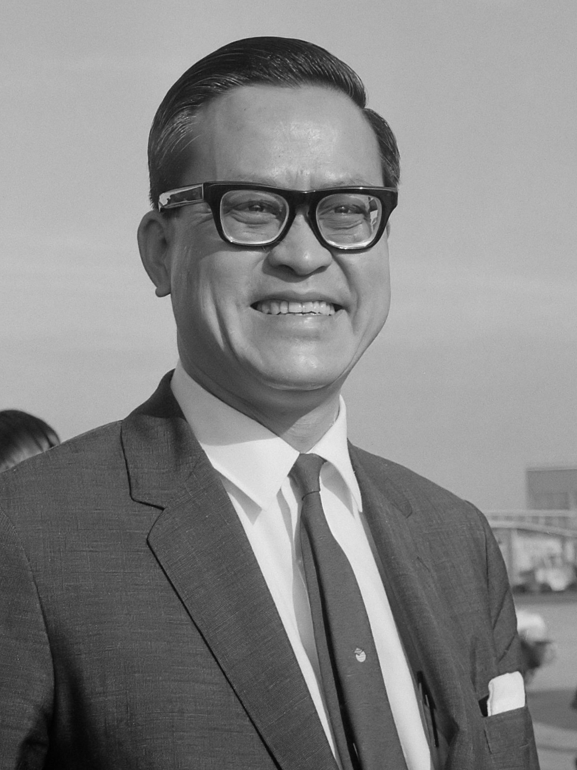 Aankomst van de minister van Gezondheid van Singapore de heer Yong Nyuk Lin op Schiphol 18 oktober 1965